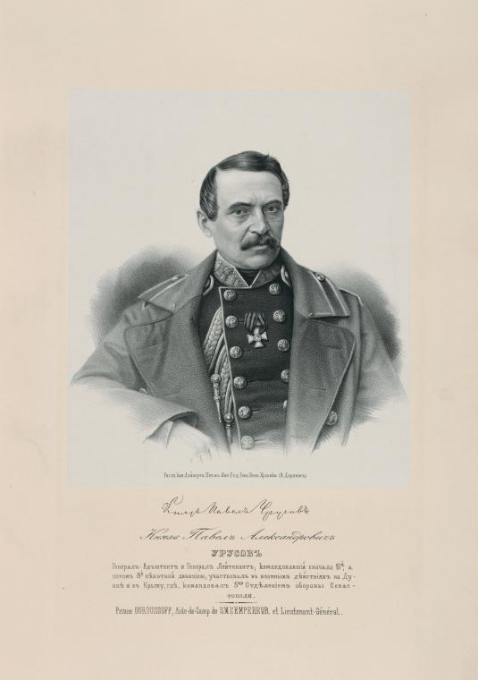 генерал-адъютант П. А. Урусов